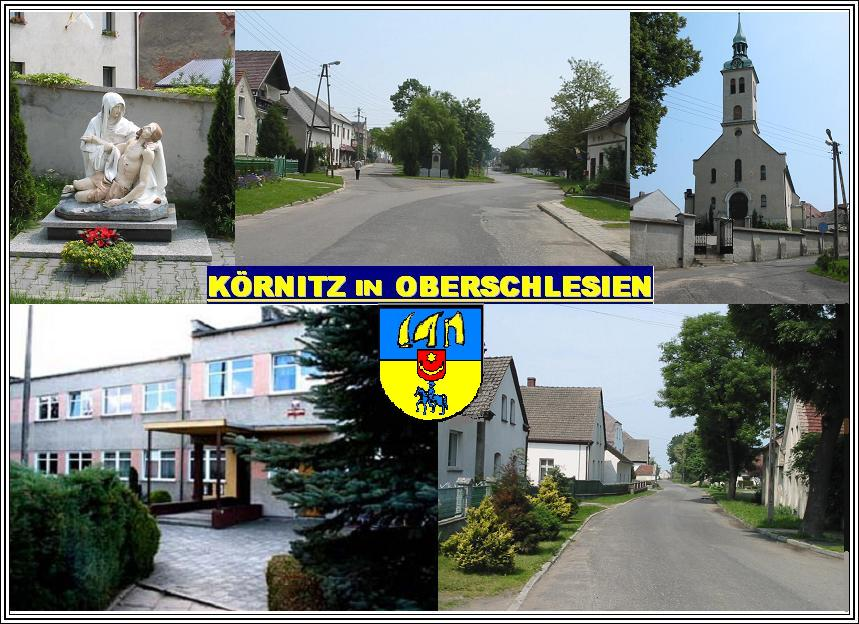 Körnitz